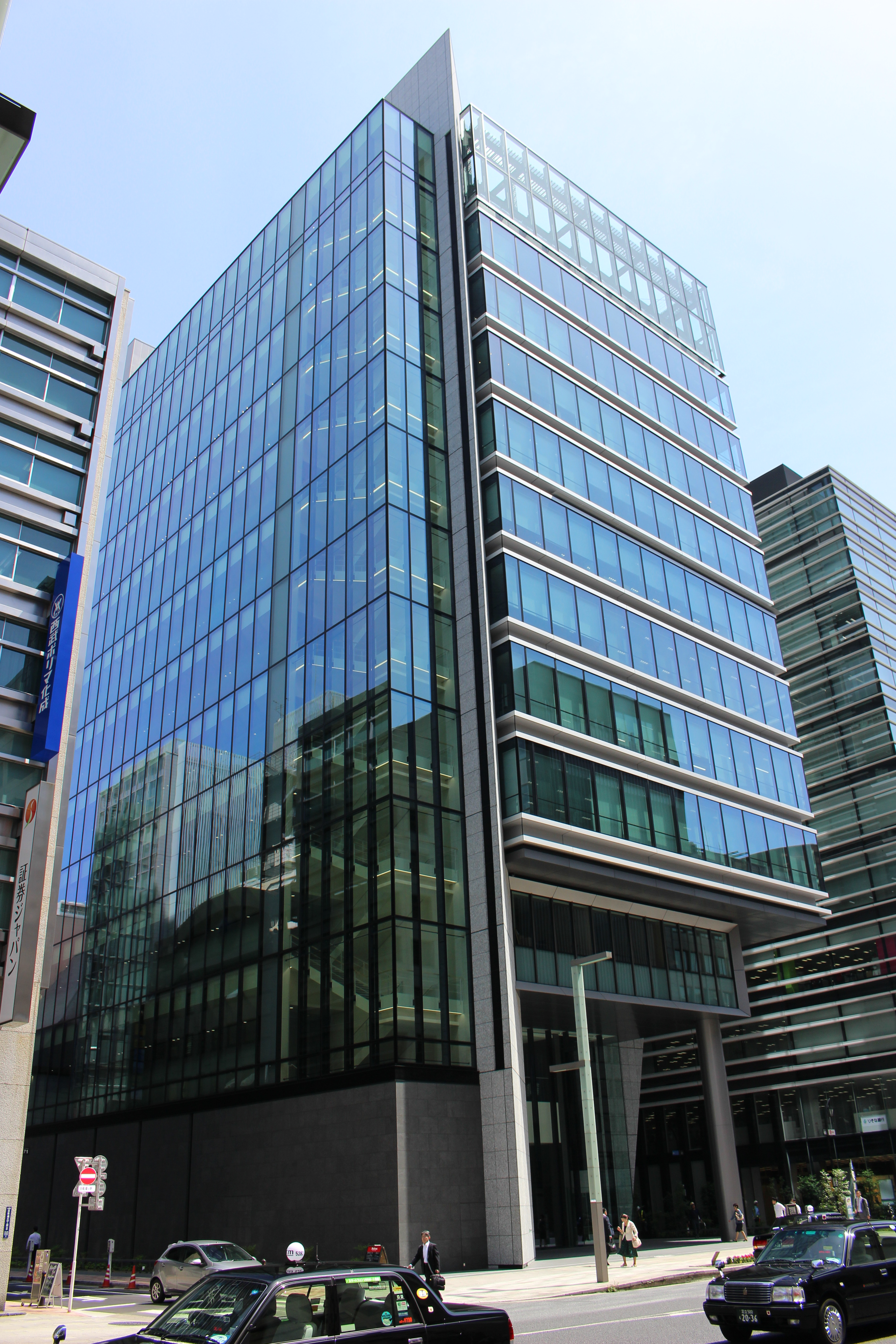 DIC本社